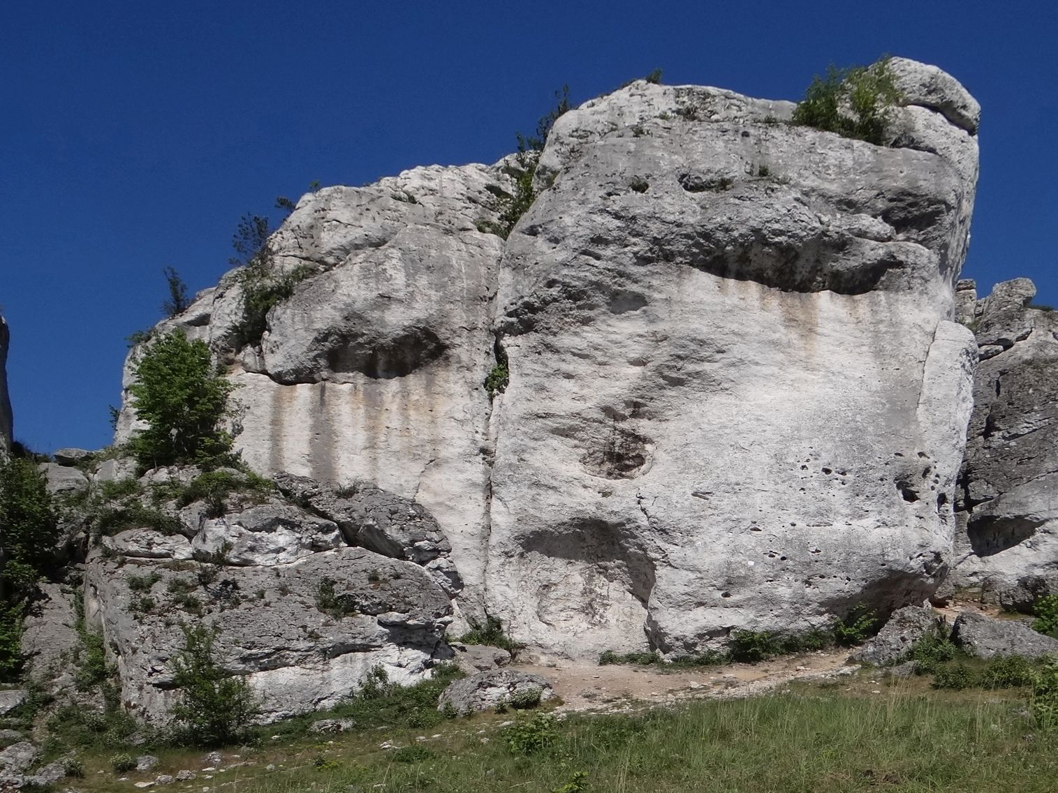 Turnia nad Kaskadą w rezerwacie przyrody Góra Zborów